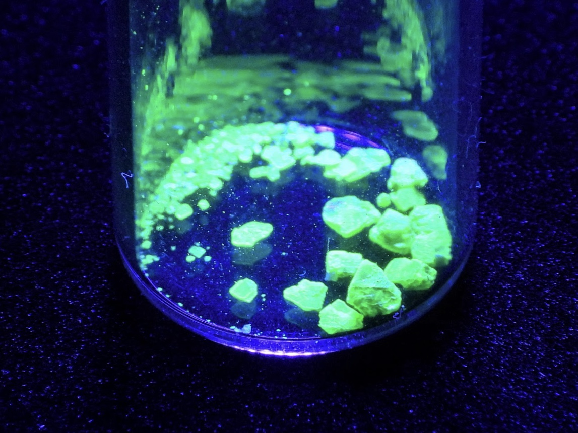 ガラス瓶に入れられた燐灰ウラン石が紫外線を照射されたことで緑色に燐光する様子